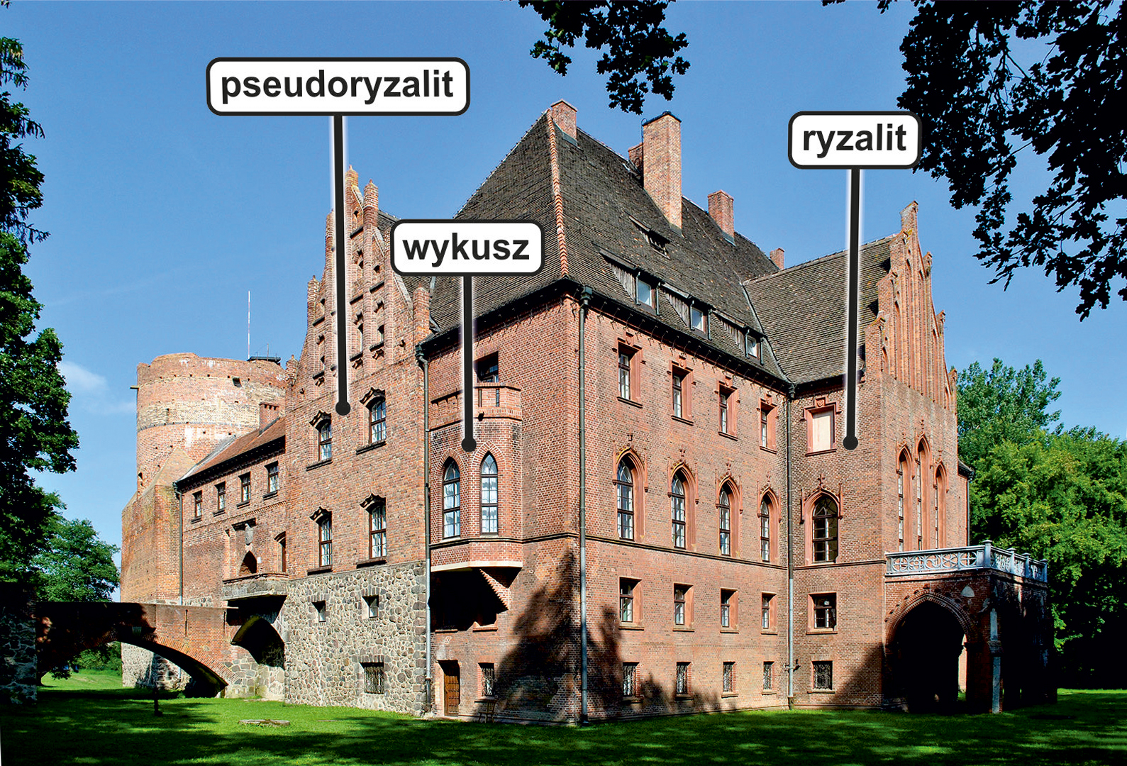 Zamek w Pęzinie